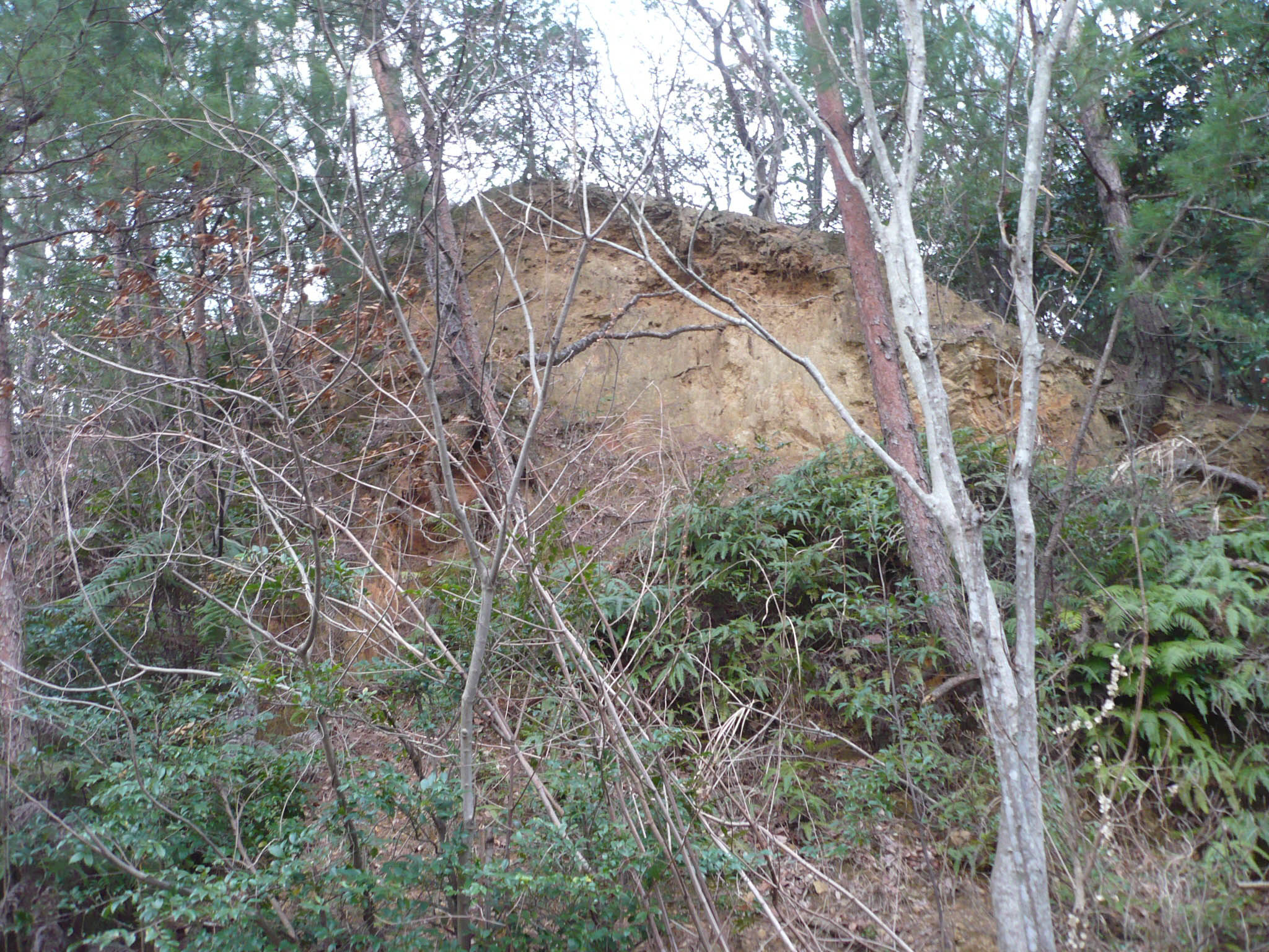 上桜城